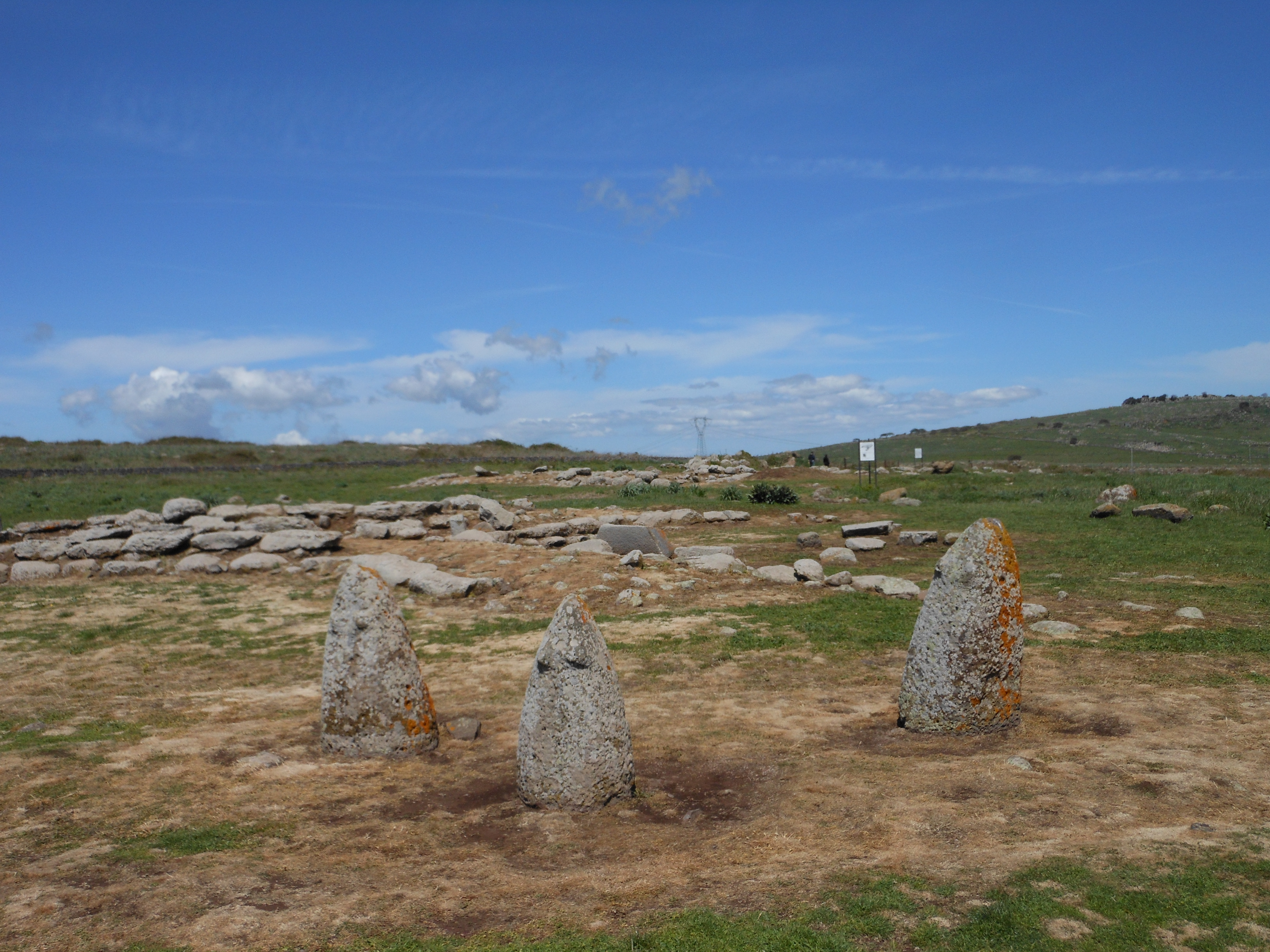 Macomer - Area archeologica di Tamuli